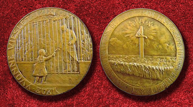 Médaille commémorative gravée vers 1928 en mémoire d'Yvonne Vieslet tuée par les allemands le 12 octobre 1918 (1908-1918)